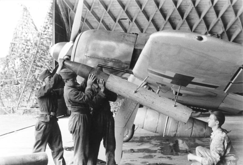 Information added by Wikimedia users.Beladen einer Fw 190 A-8 mit 21-cm-Werfergranaten (WfG. 21) zur Abwehr von schweren Bombern. Unter dem Rumpf trägt die Maschine am ETC-501-Rumpfpylon einen 300-l-Zusatztank.